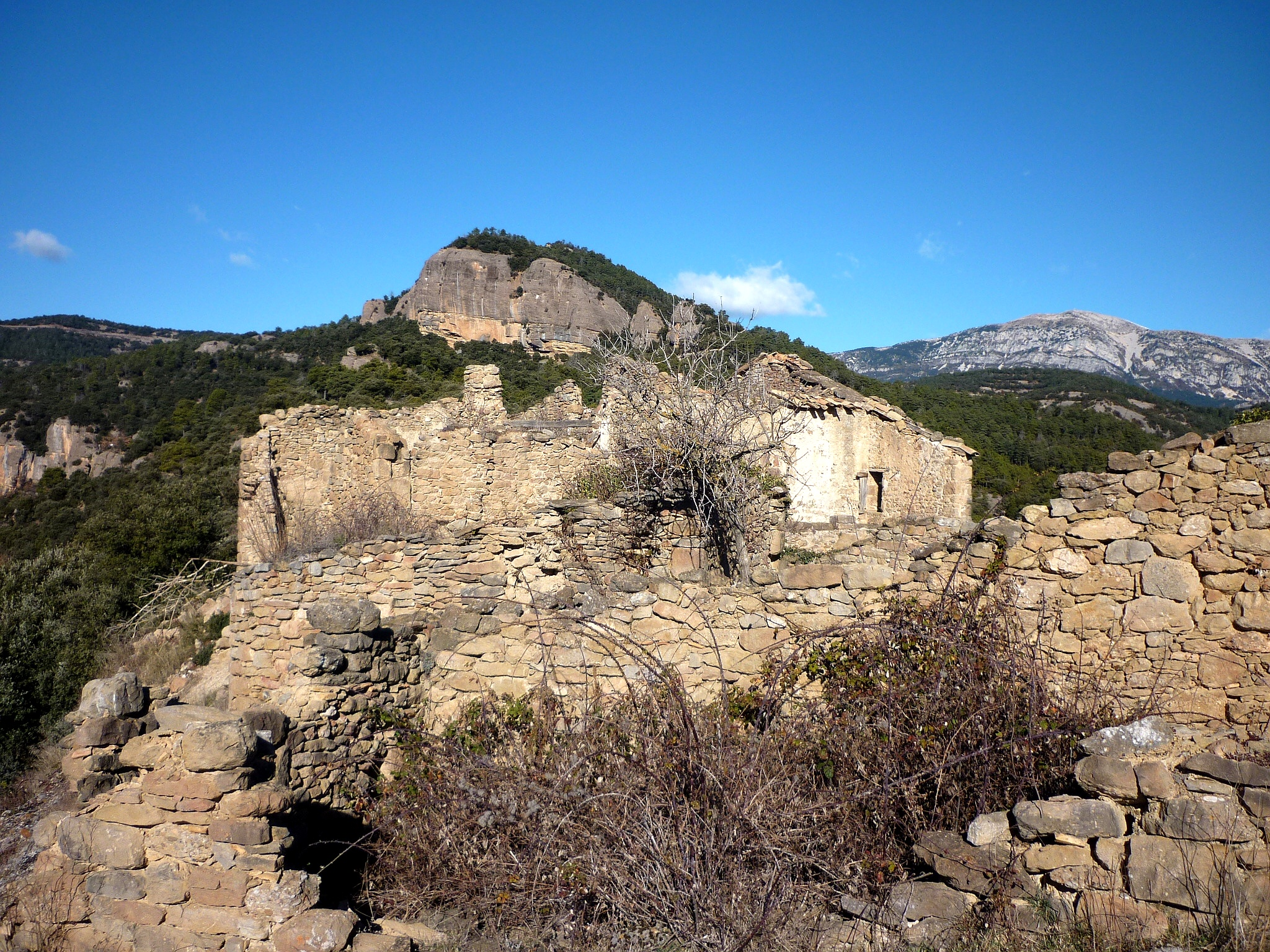 Runes de la Masía. Al fons els cingles dels Tossalets.